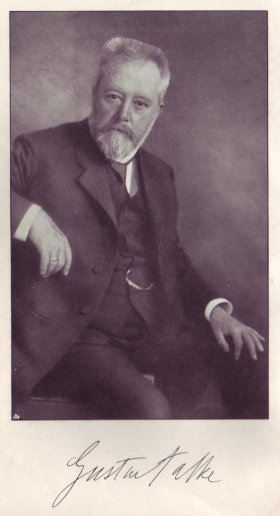 Gustav Falke (* 11. Januar 1853; † 8. Februar 1916), deutscher Schriftsteller